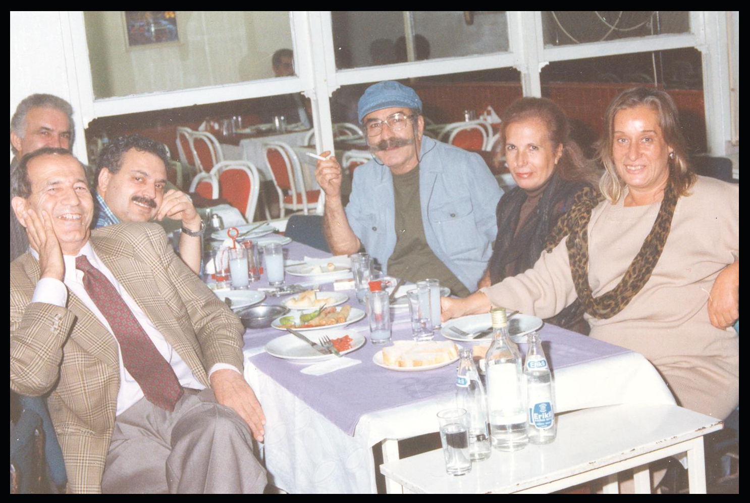 Yılmaz Onay, Oğuz Gemalmaz, Av.Ali Yaşar ve Ressam Birim Bozok Bursa'da bir meyhanede